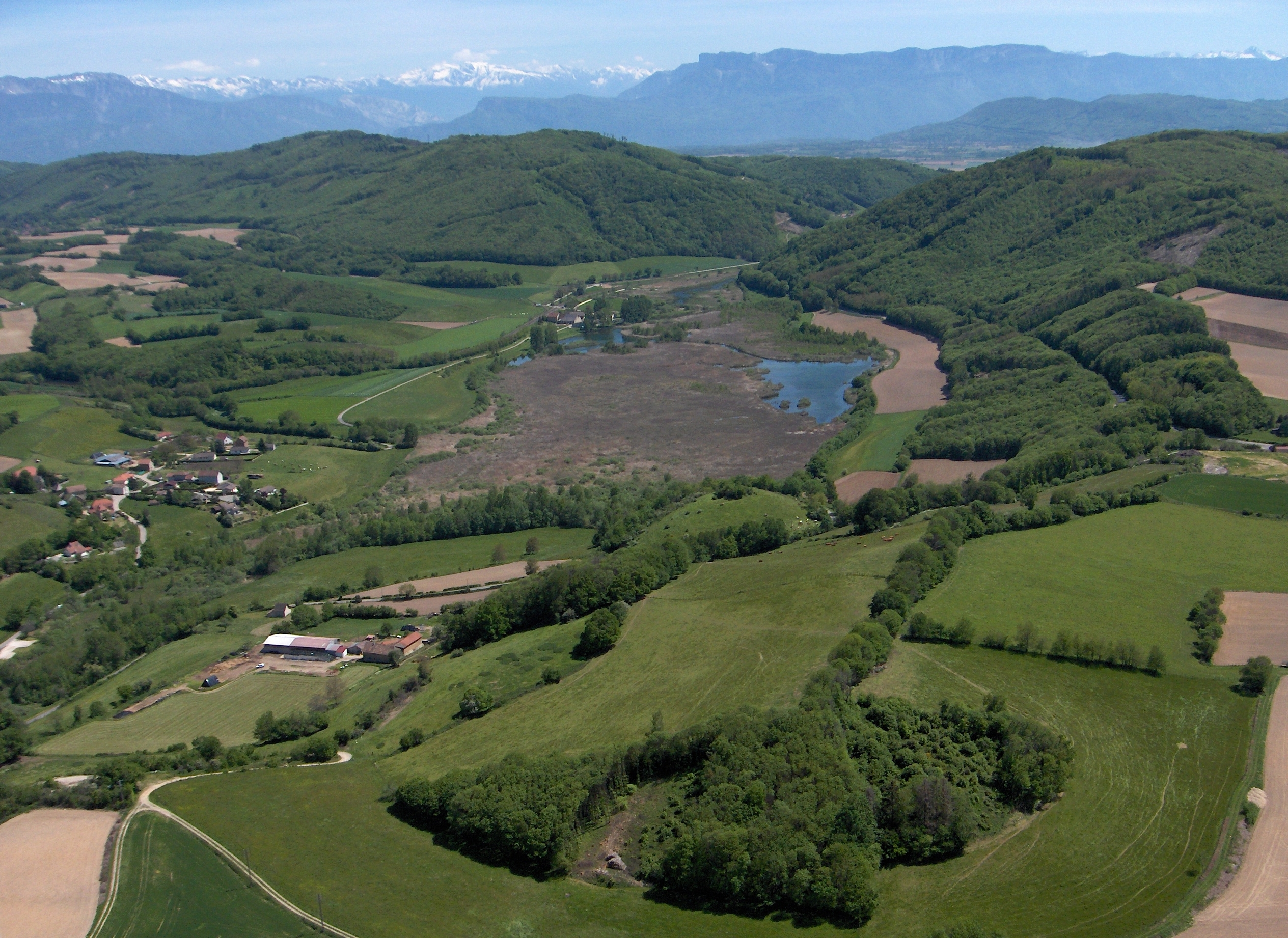 Vue d'avion de la Tourbière du Grand Lemps